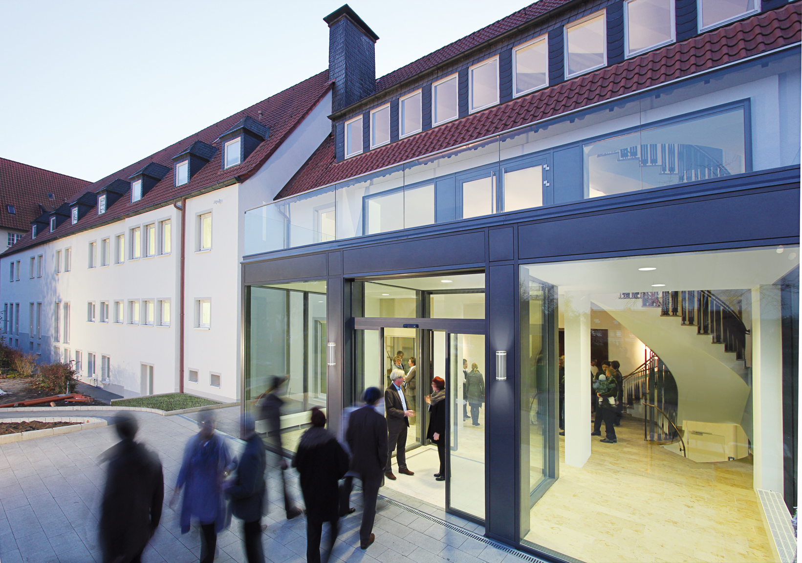 Eingang des Sozialinstituts Kommende Dortmund des Erzbistums Paderborn, Neueröffnung nach Renovierung 2011